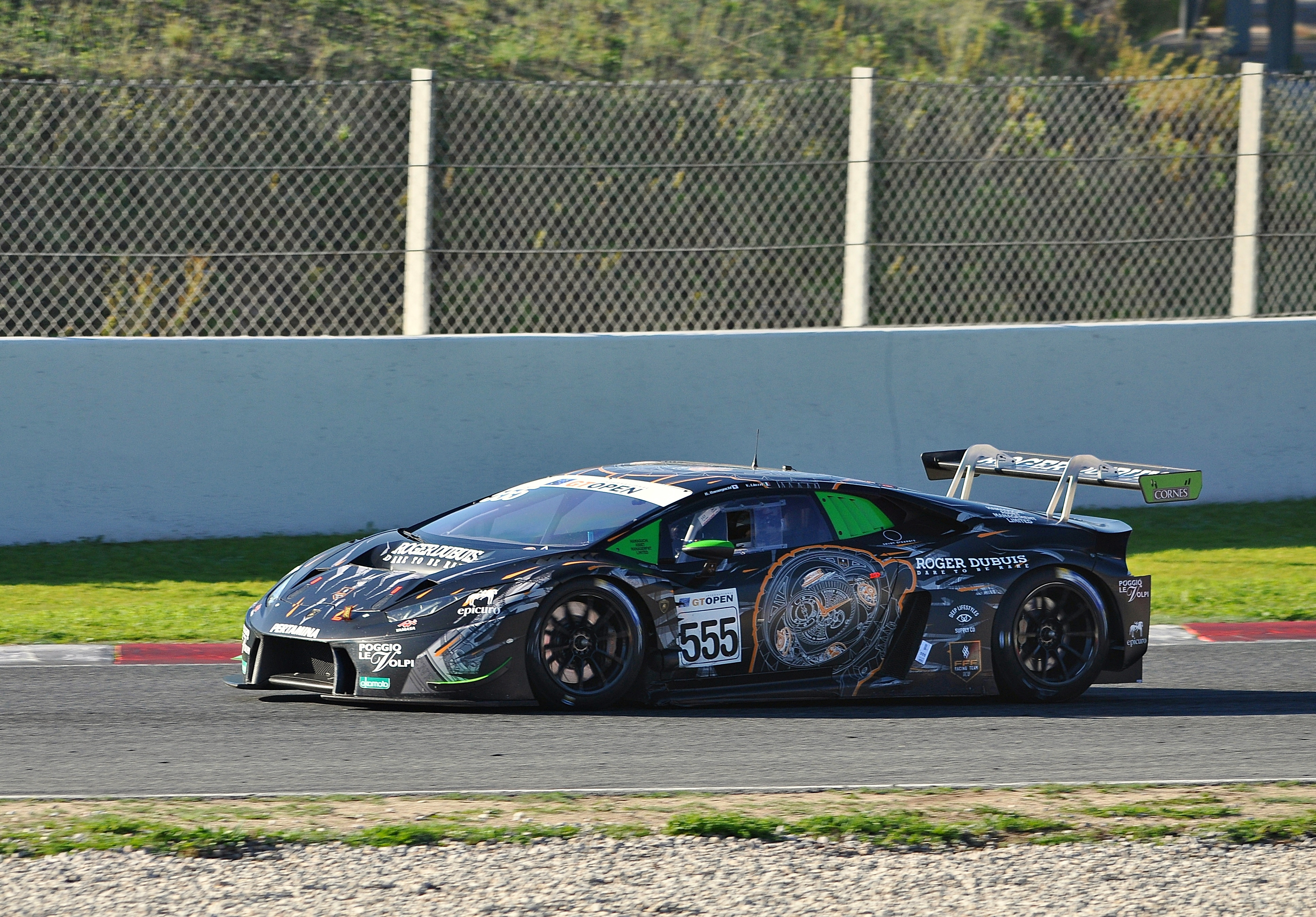 Circuito de Barcelona 2017